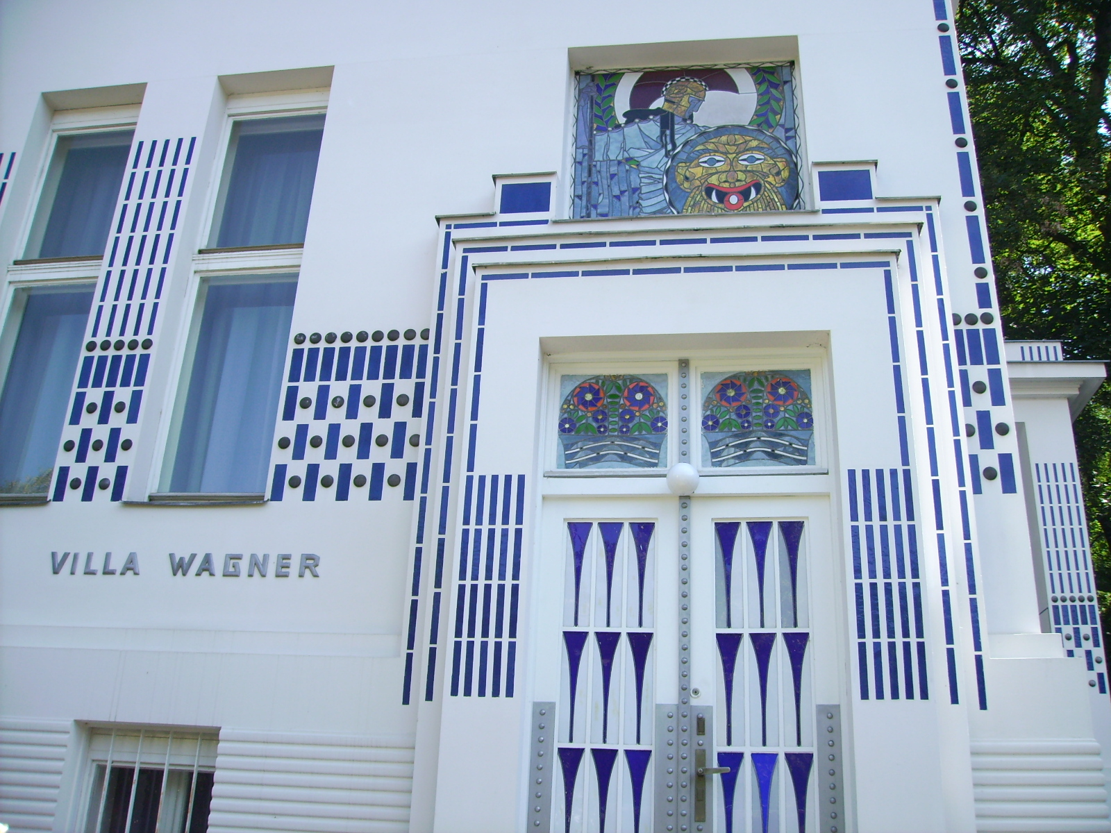 Otto Wagner, Architekt des Jugendstil in Wien (1841 - 1918). Villengebäude an der Hüttelbergstraße im 14. Wiener Gemeindebezirk Penzing.